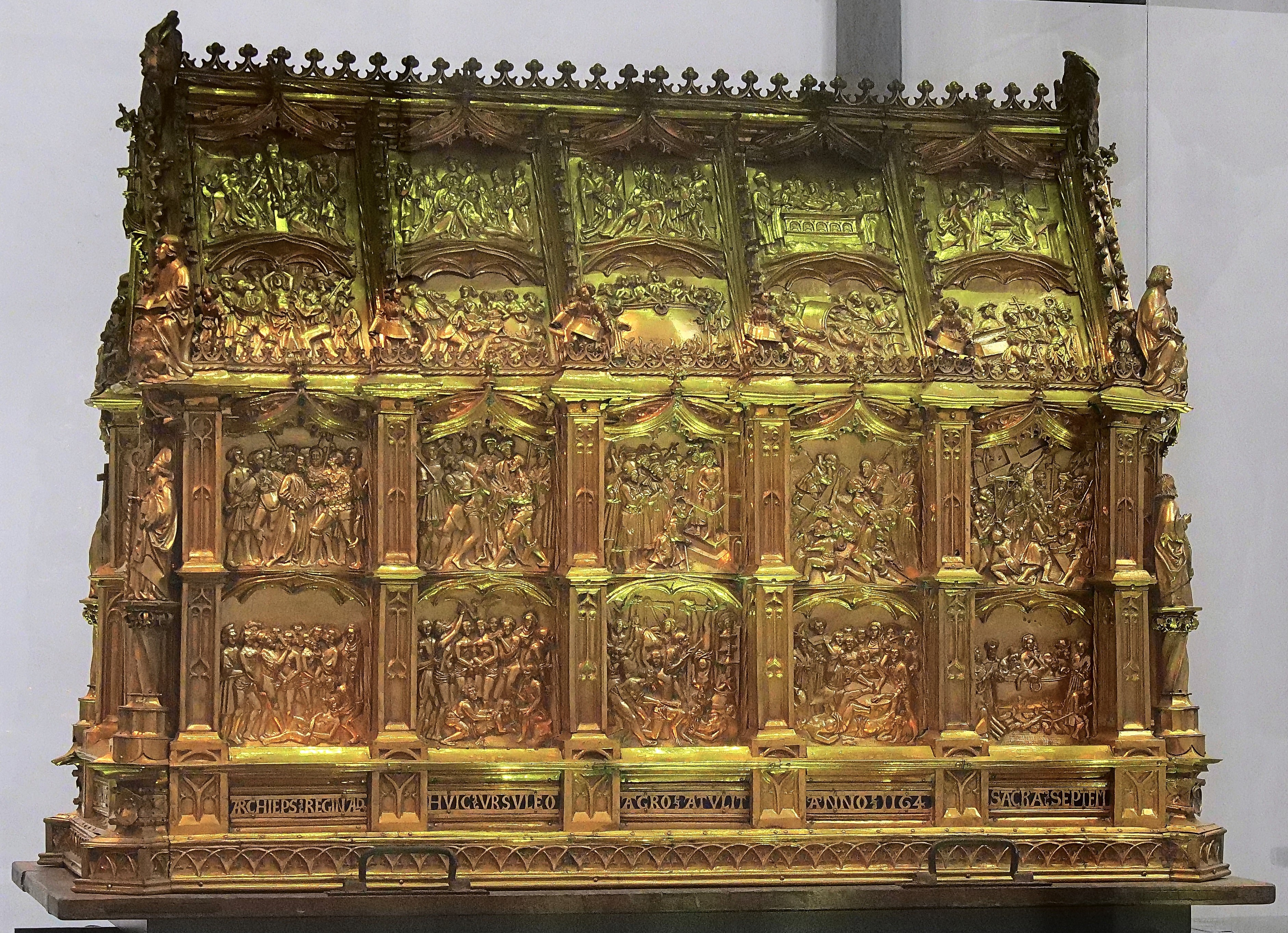 Makkabäerschrein St. Andreas Köln Der aus vergoldeten Kupferplatten gefertigte Makkabäerschrein, der der Überlieferung nach Reliquien der sieben heiligen Makkabäerbrüder und ihrer Mutter Salome (2 Makk 7 EU) beinhalten soll, stammt aus dem 16. Jahrhundert und hat das Aussehen einer Kirche. Auf den rund 40 Reliefs sind Szenen aus dem Martyrium der Makkabäer und ihrer Mutter Salome zu erkennen, die parallel zur Passion Christi und seiner Mutter Maria gesetzt werden (beispielsweise die Geißelung der Makkabäerbrüder und die von Christus). An den Ecken des Daches sind die vier Evangelisten in zeitgenössischer Humanisten-Tracht dargestellt: Matthäus, Johannes, Lukas und Markus und an den Eckpfeilern Figuren von Christus, Helena, Maria und einem Priester.